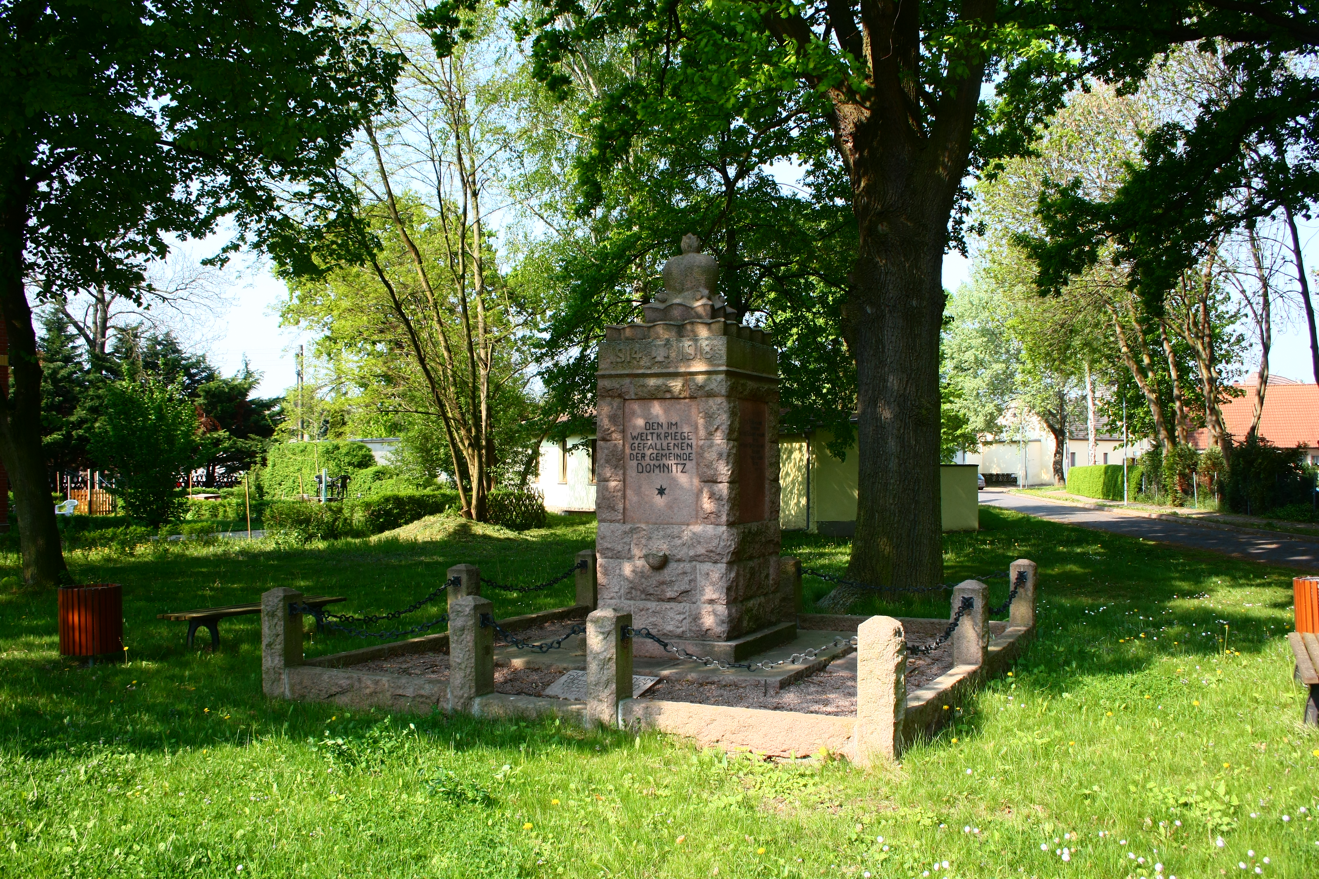 das Denkmal für die Gefallenen des Ersten Weltkriegs in Domnitz